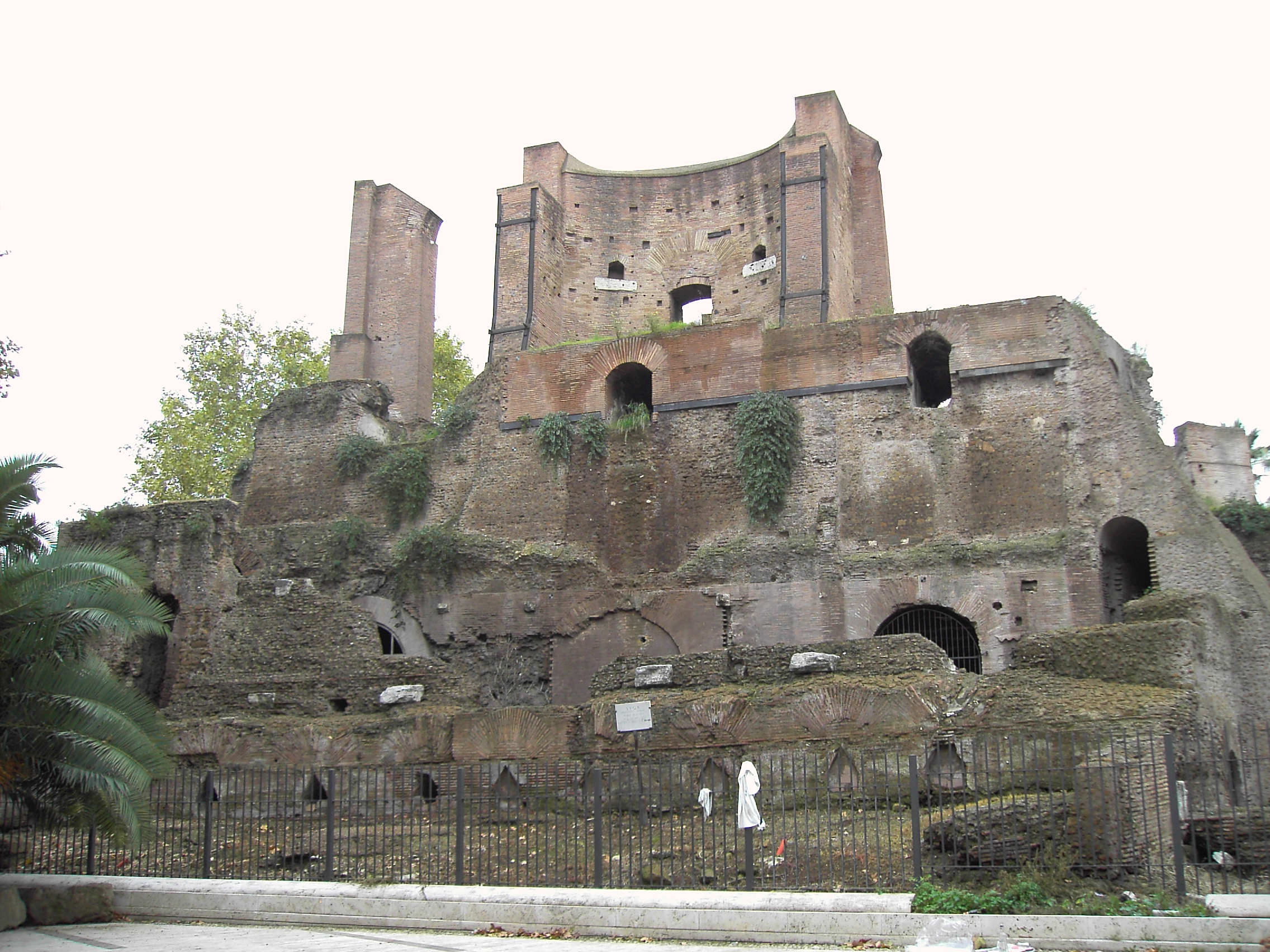 Roma, piazza Vittorio: trofei di Mario o "ninfeo di Mario" (vista frontale) by Lalupa